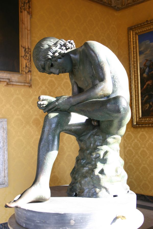 Le tireur d'épine - sculpture - Musée du Capitole (Rome)